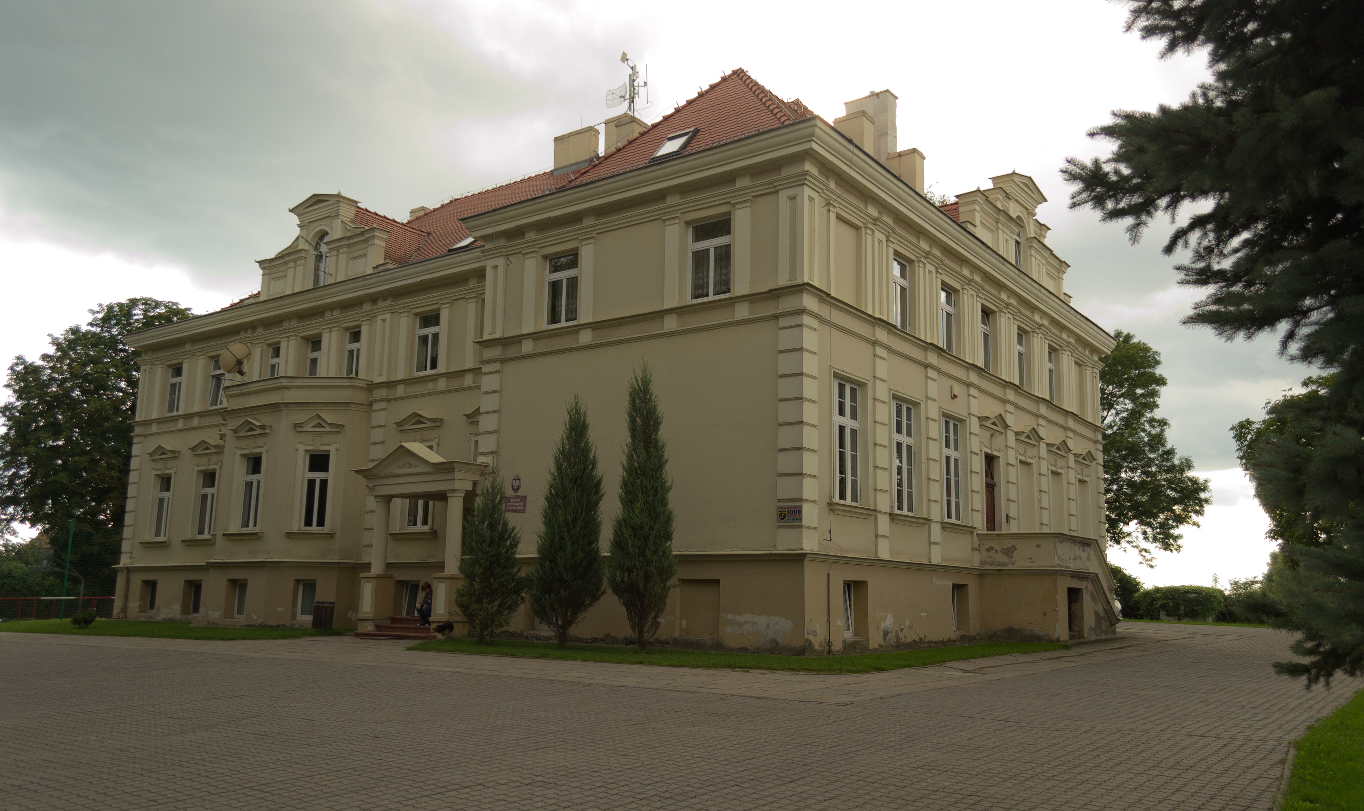 Zespół pałacowy w Kruszynie, 2 poł. XIX w.: pałac (dec. dwór), 1882 (od 1908 szkoła); park